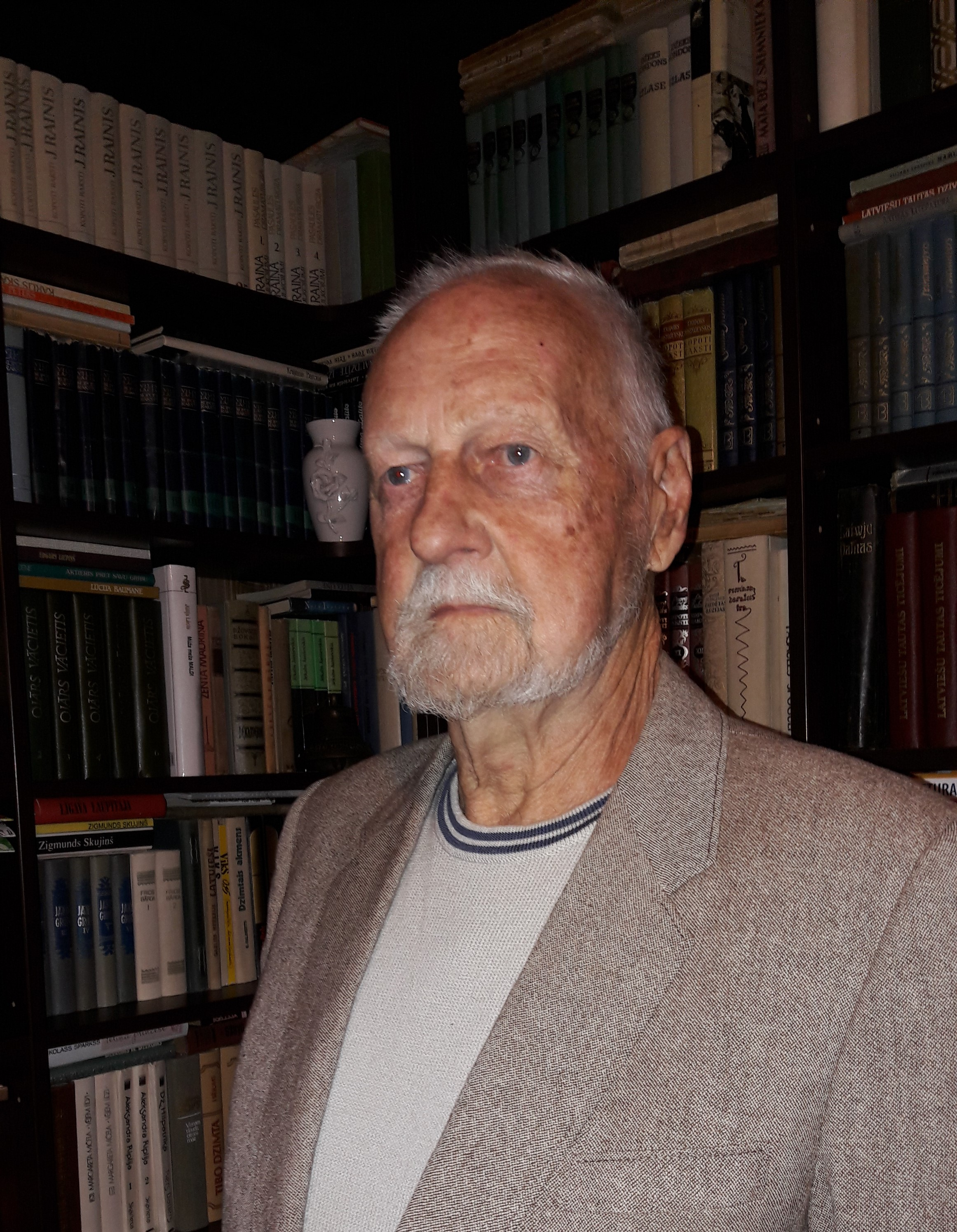 Aivars Čakste 2016. gadā.